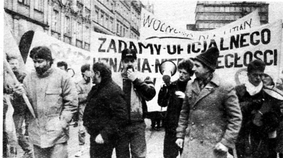 Demonstracja (15.1.1991) Komitetu Solidarności z Litwą we Wrocławiu, w Rynku, po masakrze w Wilnie z 13.1.1991. Po lewej na pierwszym planie - Władysław Frasyniuk.